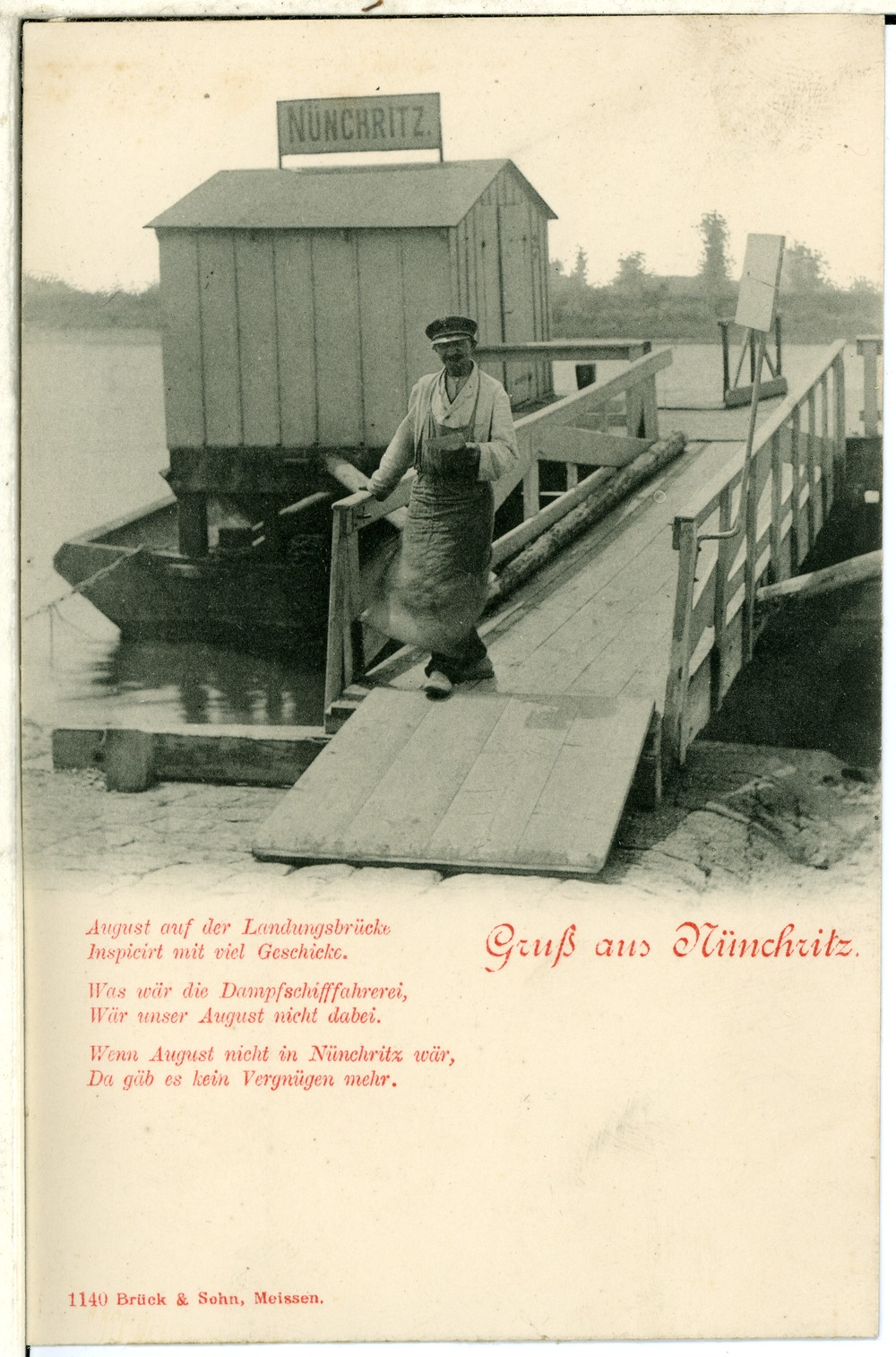 Nünchritz; Dampfschiffanlegestelle mit Spruch This postcard is from publisher Brück & Sohn in Meißen ( postcard has a unique number 01140 and is available in a higher resolution at the publisher. This images was uploaded in a cooperation project between Wikipedians and the publisher.